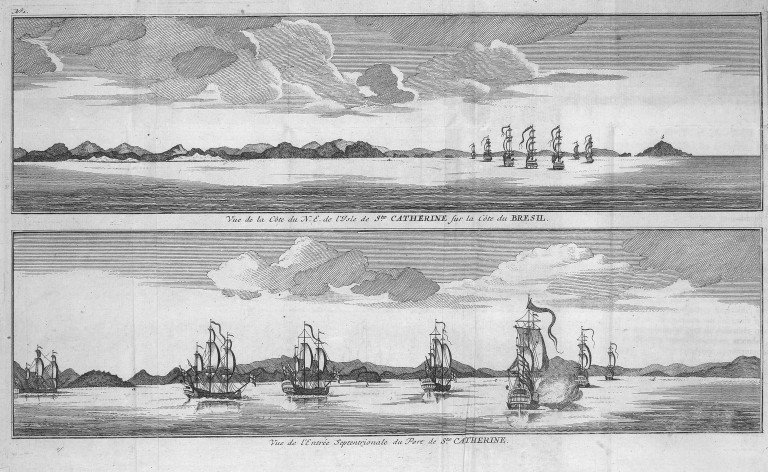 [Illustrations de Voyage autour du monde] Auteur : George Anson Éditeur : Henri-Albert Gosse et Compagnie (Genève) 1750